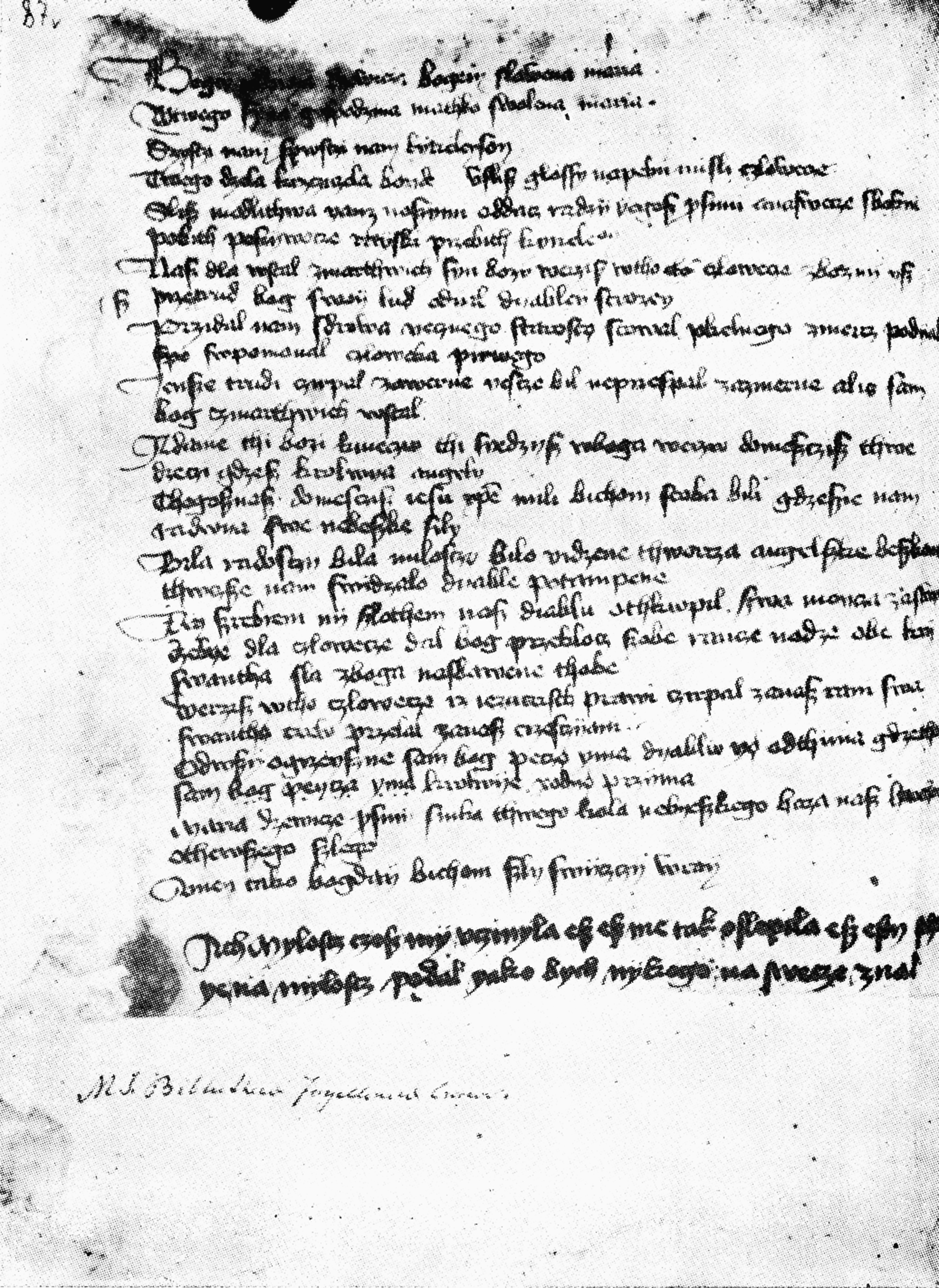 Rękopis Bogurodzicy przechowywany w Bibliotece Jagiellońskiej w Krakowie, sygn. 408, karta 87 verso.